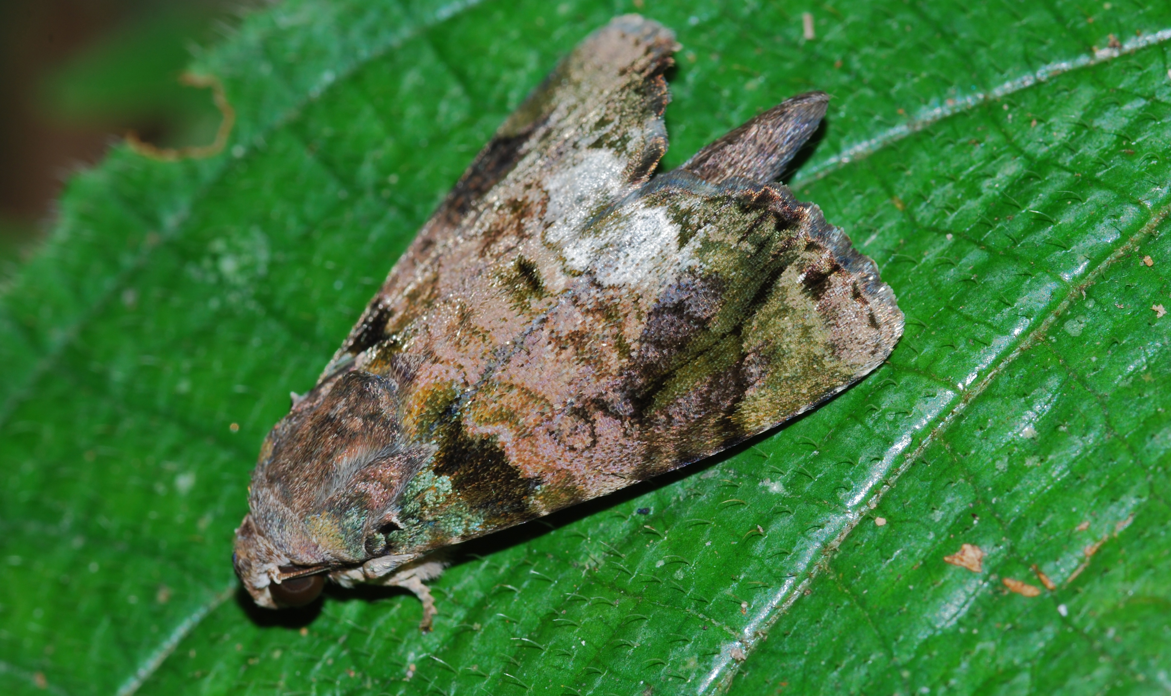 Taman Negara NP, Pahang, MALAYSIA